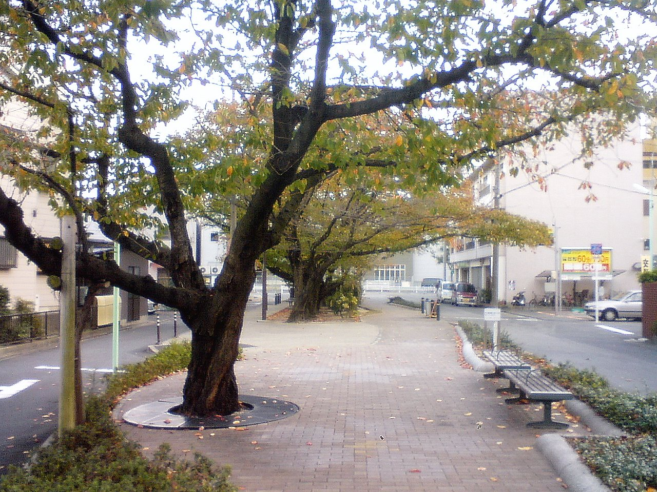 中井筋緑道 烏森駅前